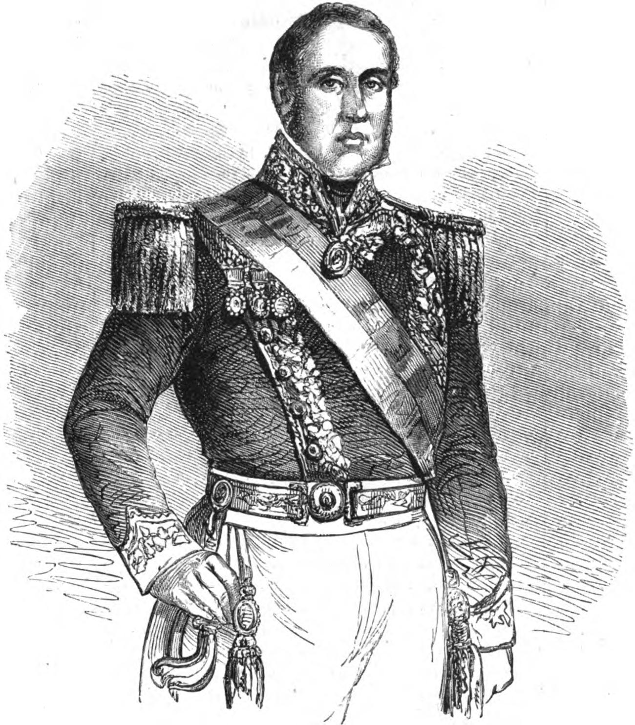 Don Justo José de Urquiza, capitaine général de la République Argentine.